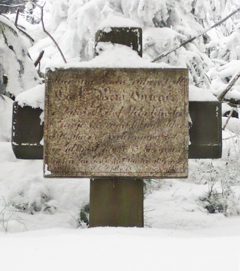 Krzyż na Wielkiej Sowie